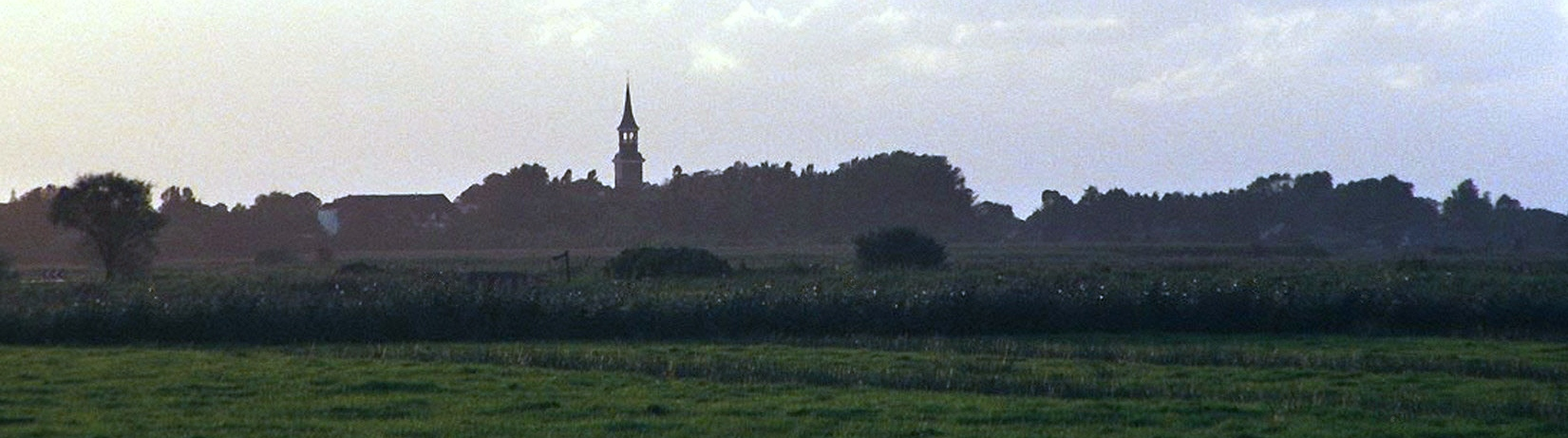 Blick auf die Gemeinde Lunden mit dem weithin sichtbaren Turm der St. Laurentiuskirche